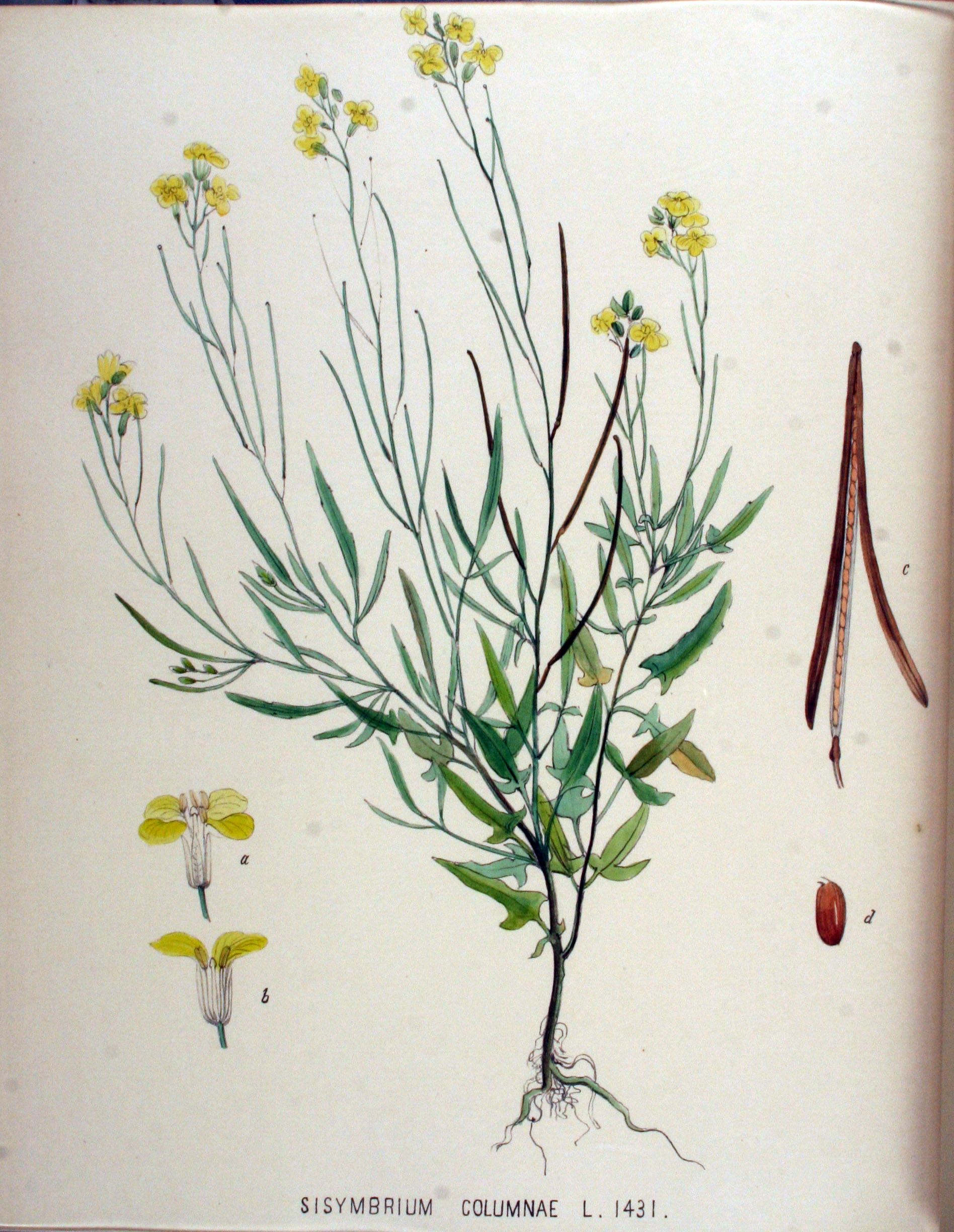 Sisymbrium orientale L. (Syn. Sisymbrium columnae Jacq.)